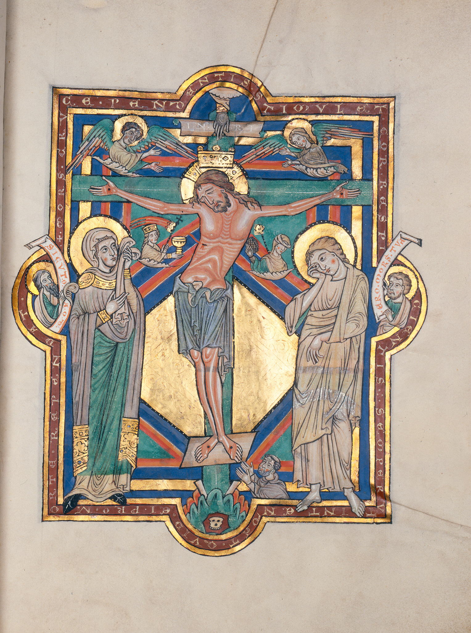 Evangelistar von Speyer, um 1220; Manuscript in the Badische Landesbibliothek, Karlsruhe, Germany, Cod. Bruchsal 1, Bl. 31r